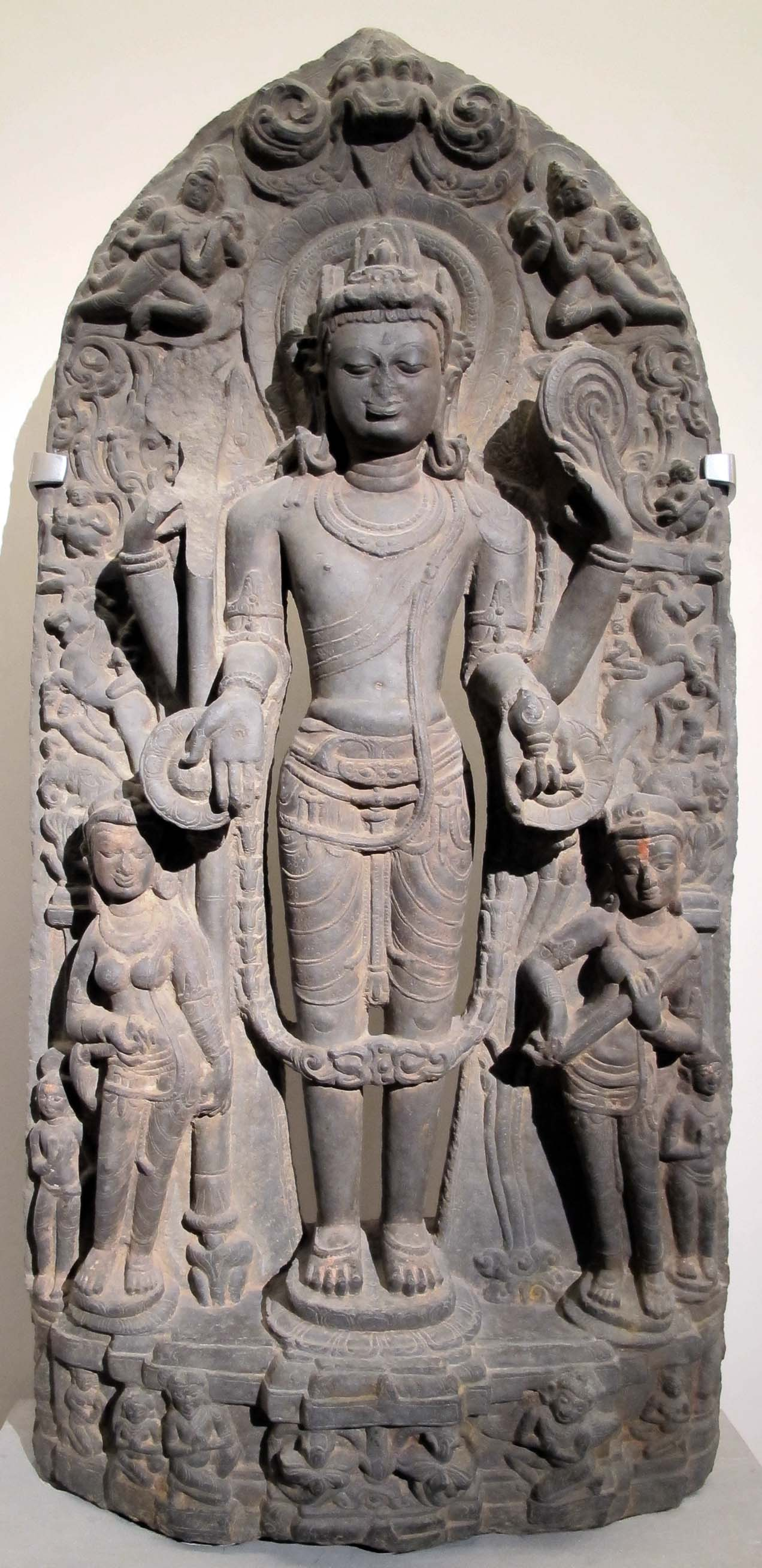 Bengala, epoca pala-sena, vishnu vasudeva, xii sec